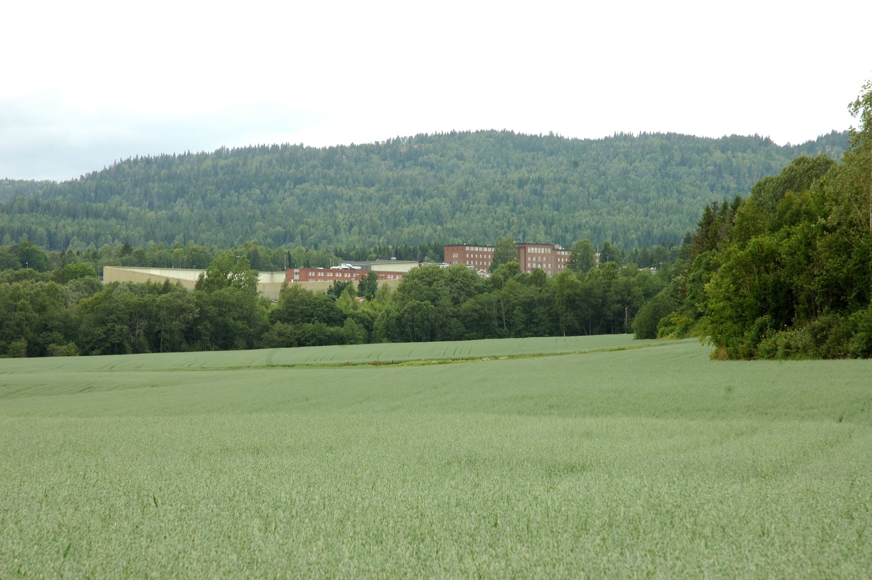 Ila Jail in Baerum in Norway Ila fengsel, forvaring- og sikringsanatalt